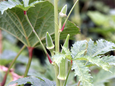 Okragewächs